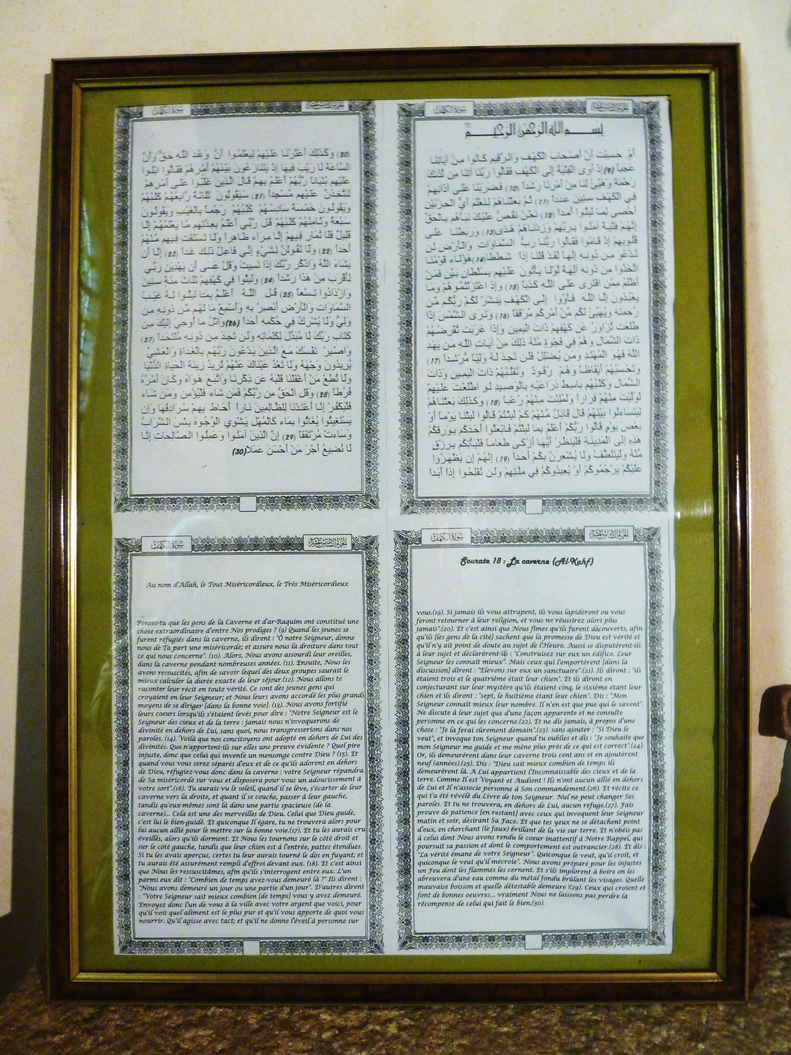 Le Vieux-Marché, chapelle des Sept-Saints : texte de prière multiconfessionnelle